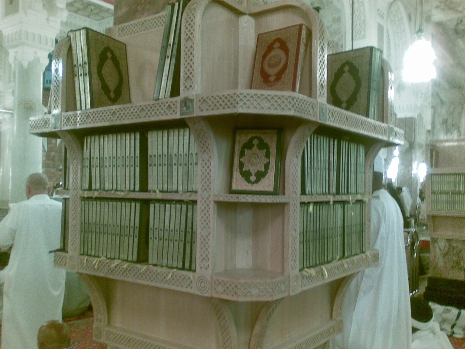 മസ്ജിദുൽ ഹറമിലെ ഖുറാൻ അലമാര